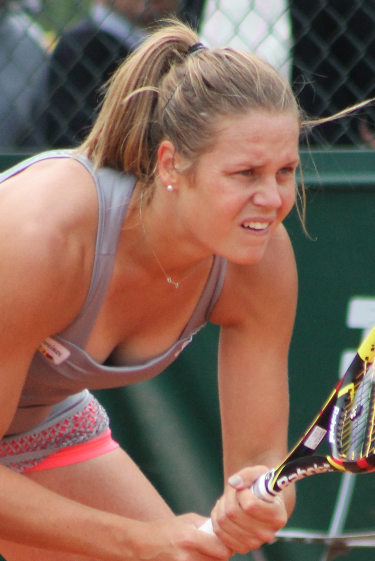 Knapp RG15